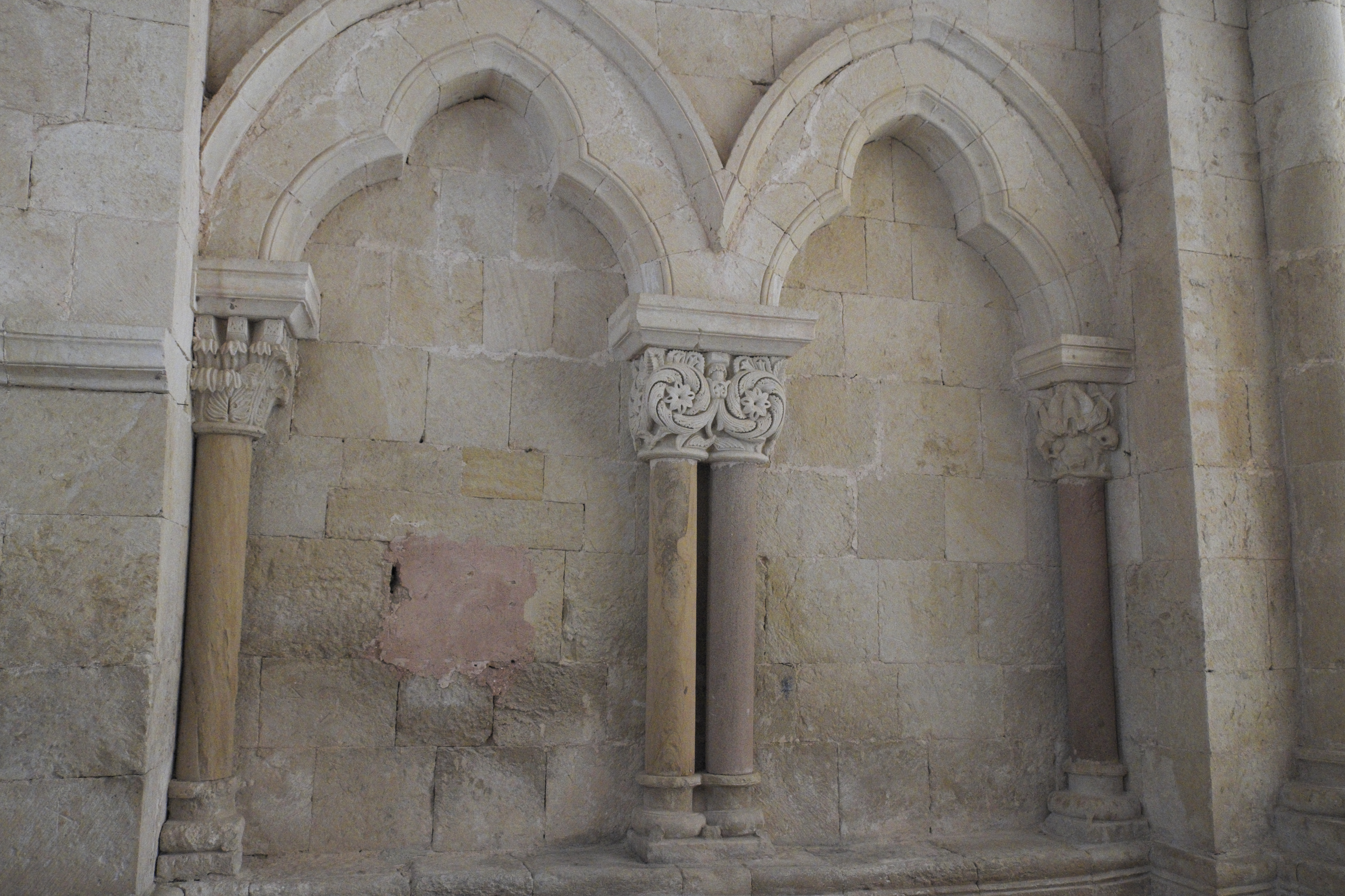 Ermita de Santa Cecilia in Vallespinoso de Aguilar in der Provinz Palencia (Kastilien-León/Spanien), Blendarkaden mit Dreipassbögen